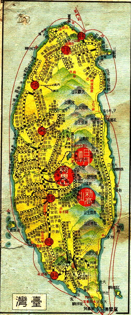 中文（台灣）: 取自早年之地圖集